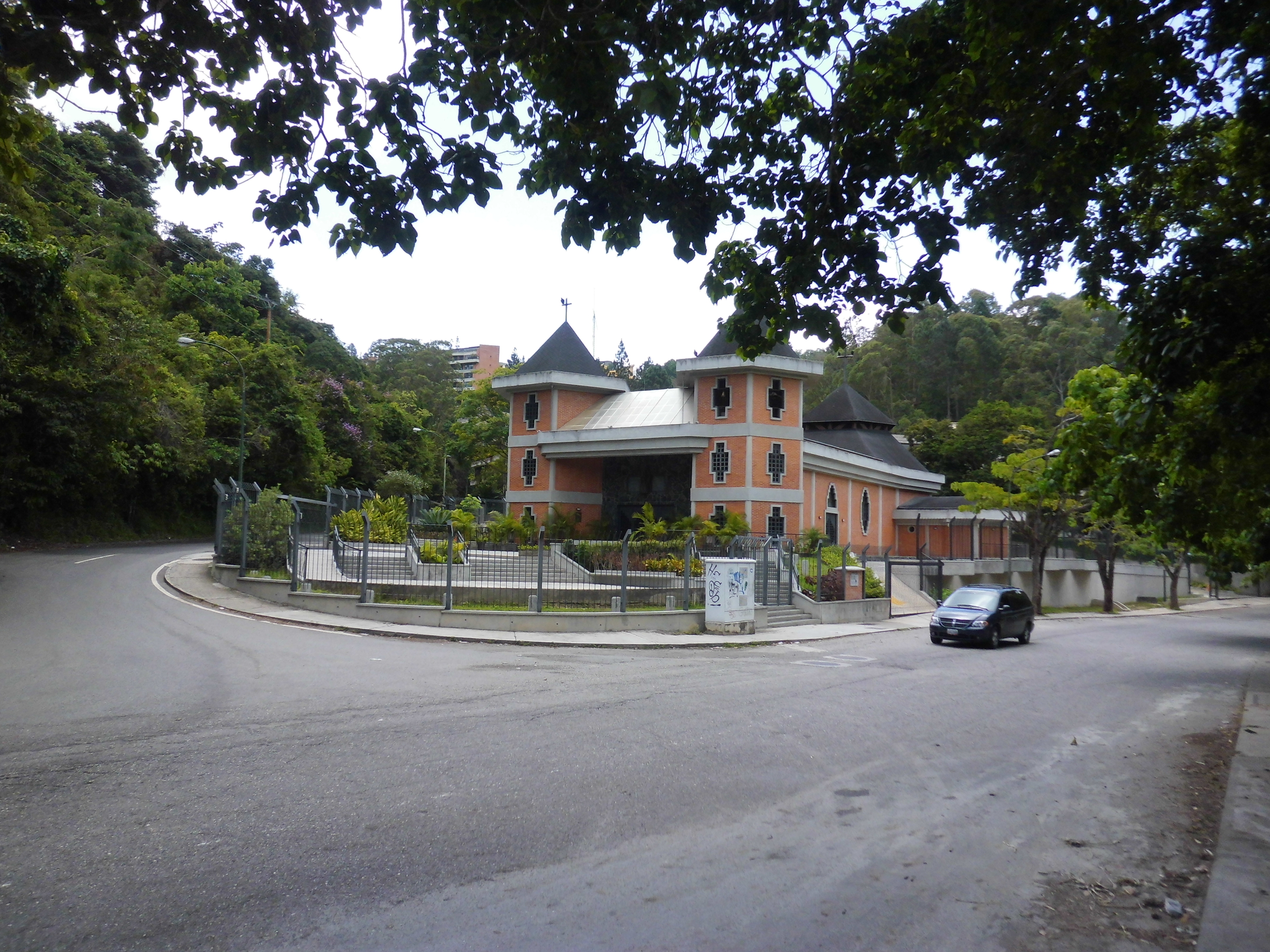 Capilla de Santa Ana - La Lagunita, municipio El Hatillo, estado Miranda - Venezuela.